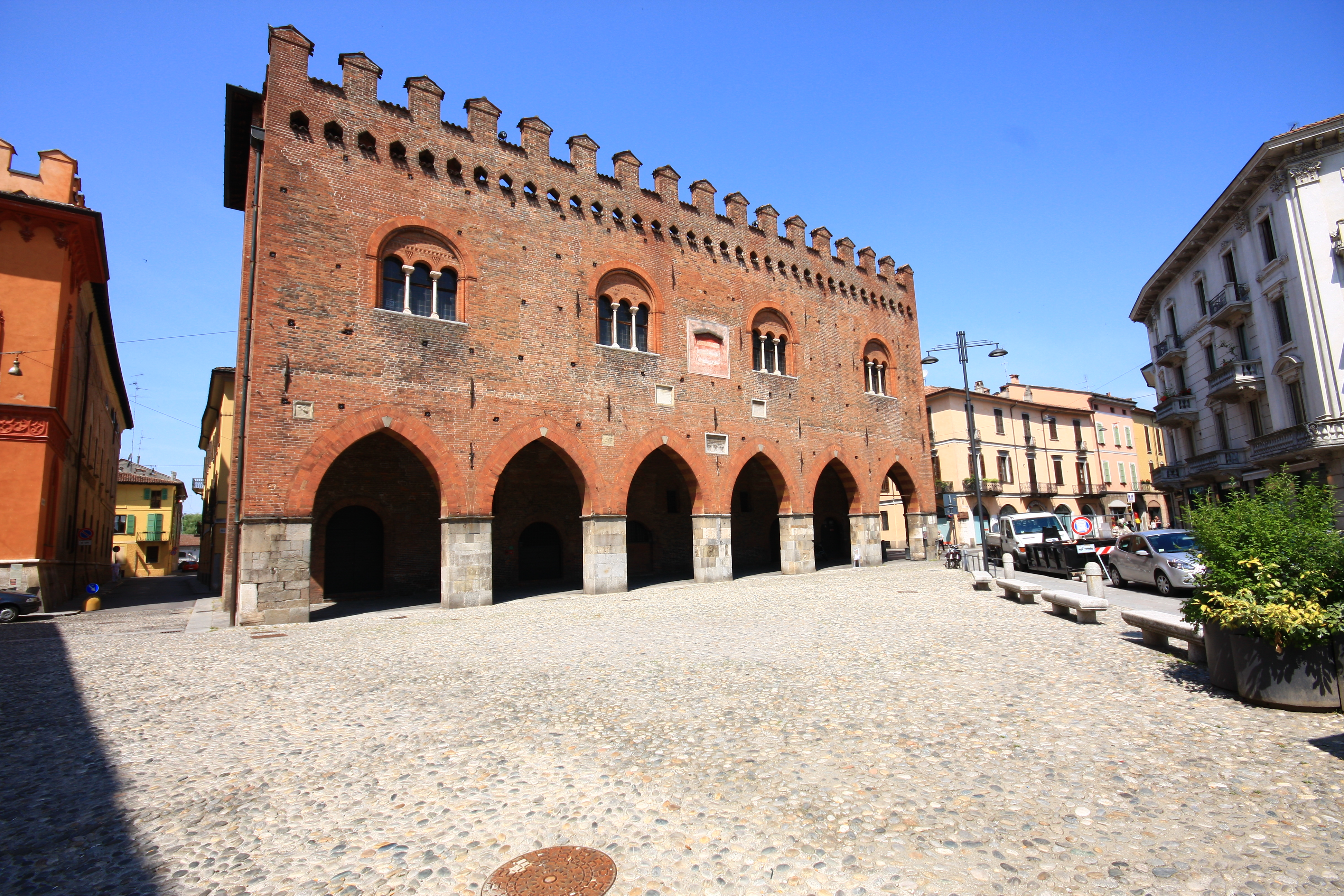 Palazzo Cittanova This is a photo of a monument which is part of cultural heritage of Italy.